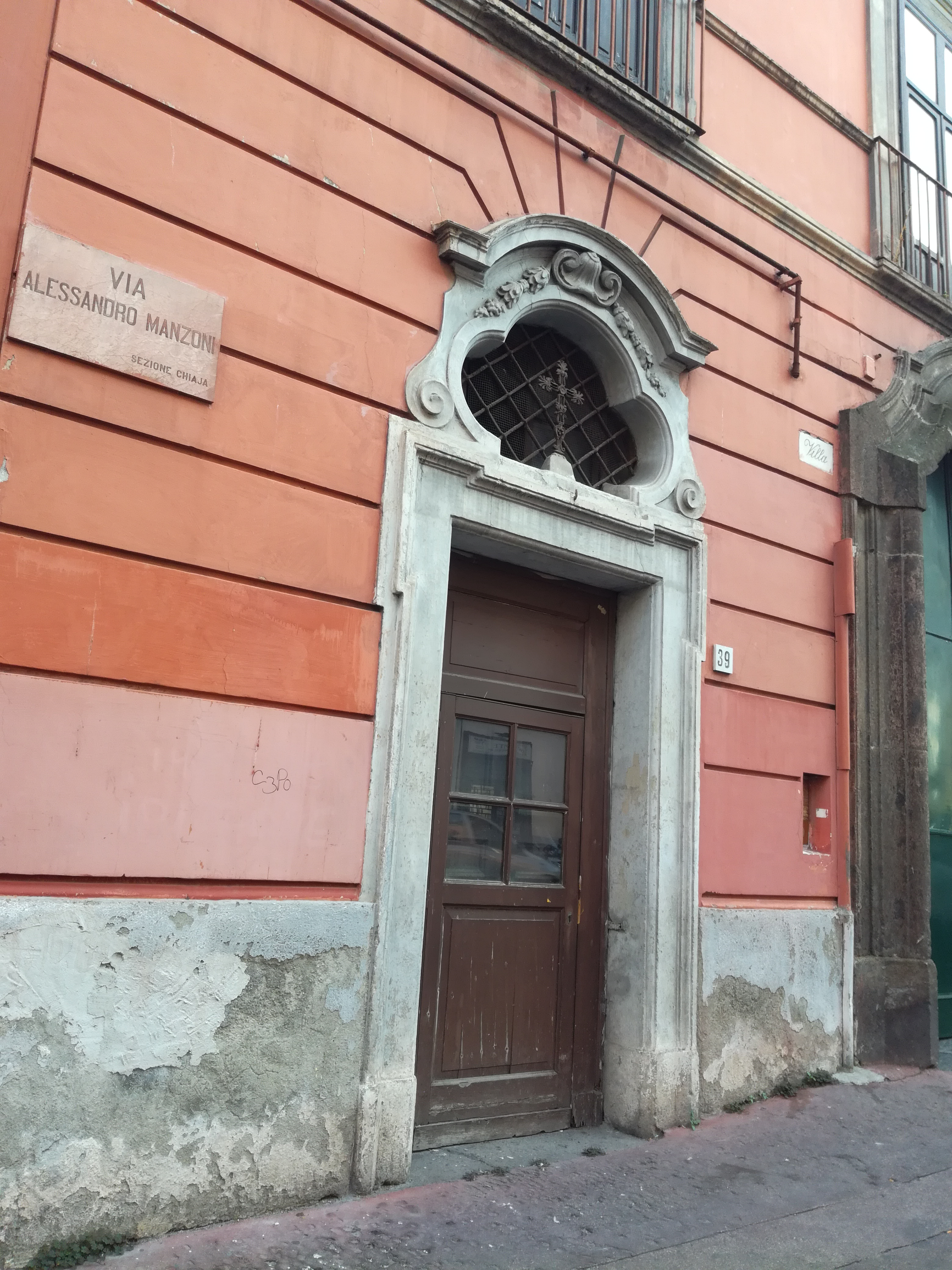 Chiesa di Villa Patrizi (Napoli)